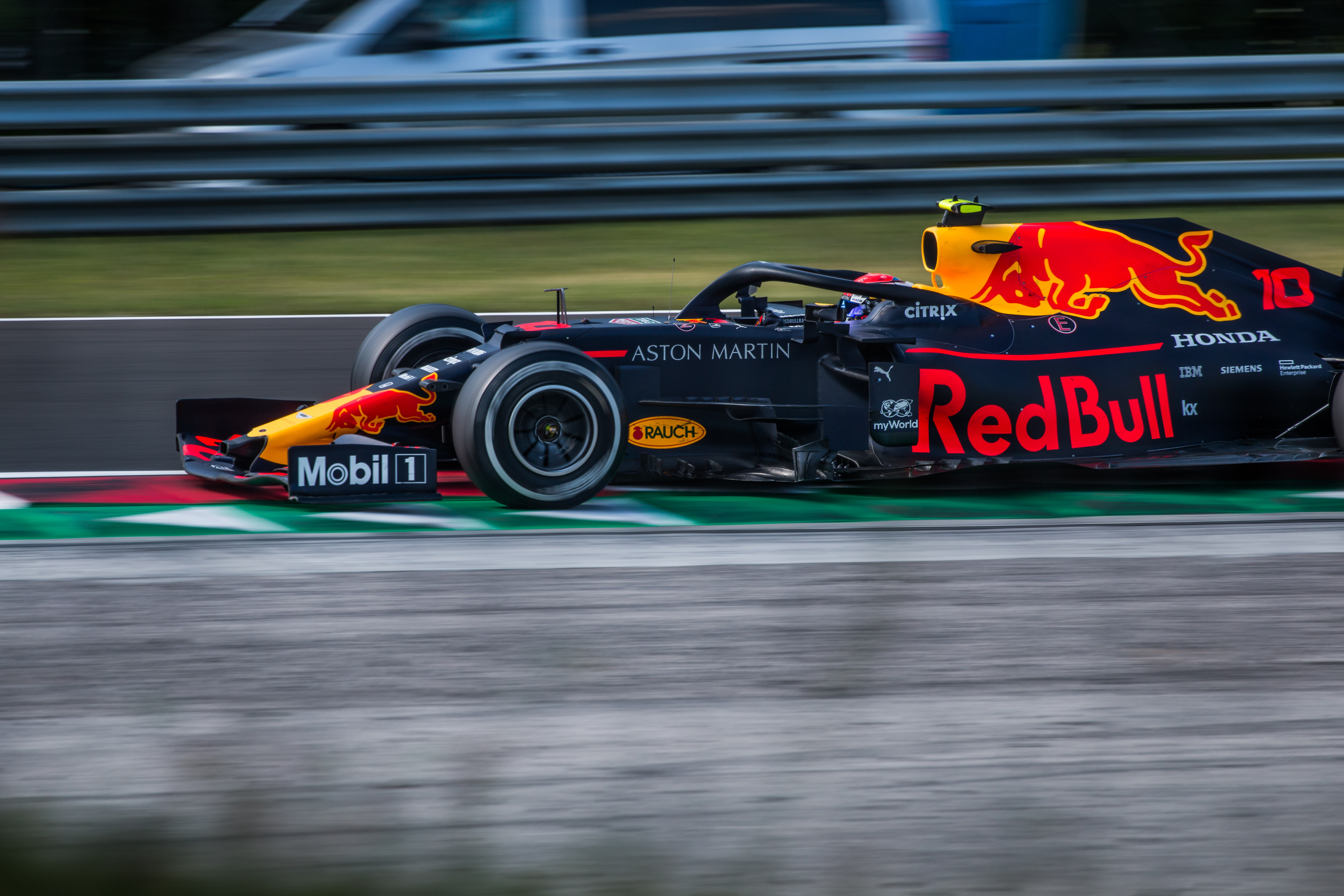 Pierre Gasly in his Red Bull RB15 during Formula 1 Hungarian Grand Prix 2019 on the Hungaroring